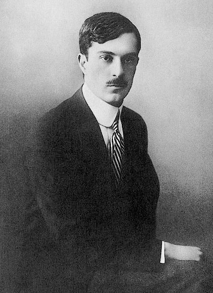 Veljko Petrović (poet)